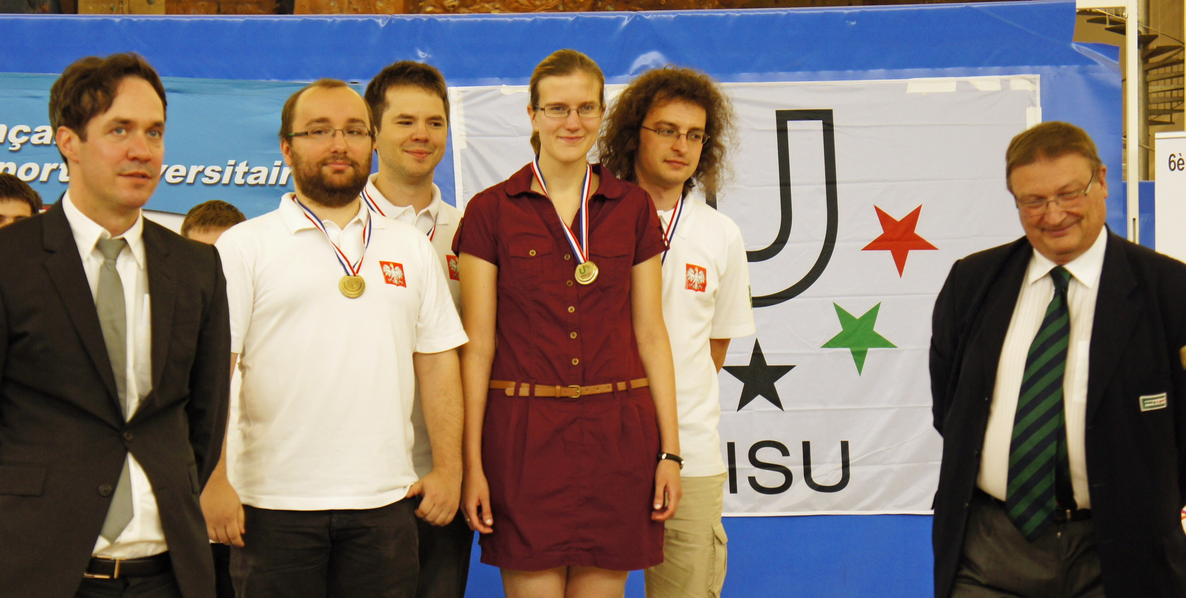 L'équipe 2 de la Pologne, troisième au championnat du monde de bridge.